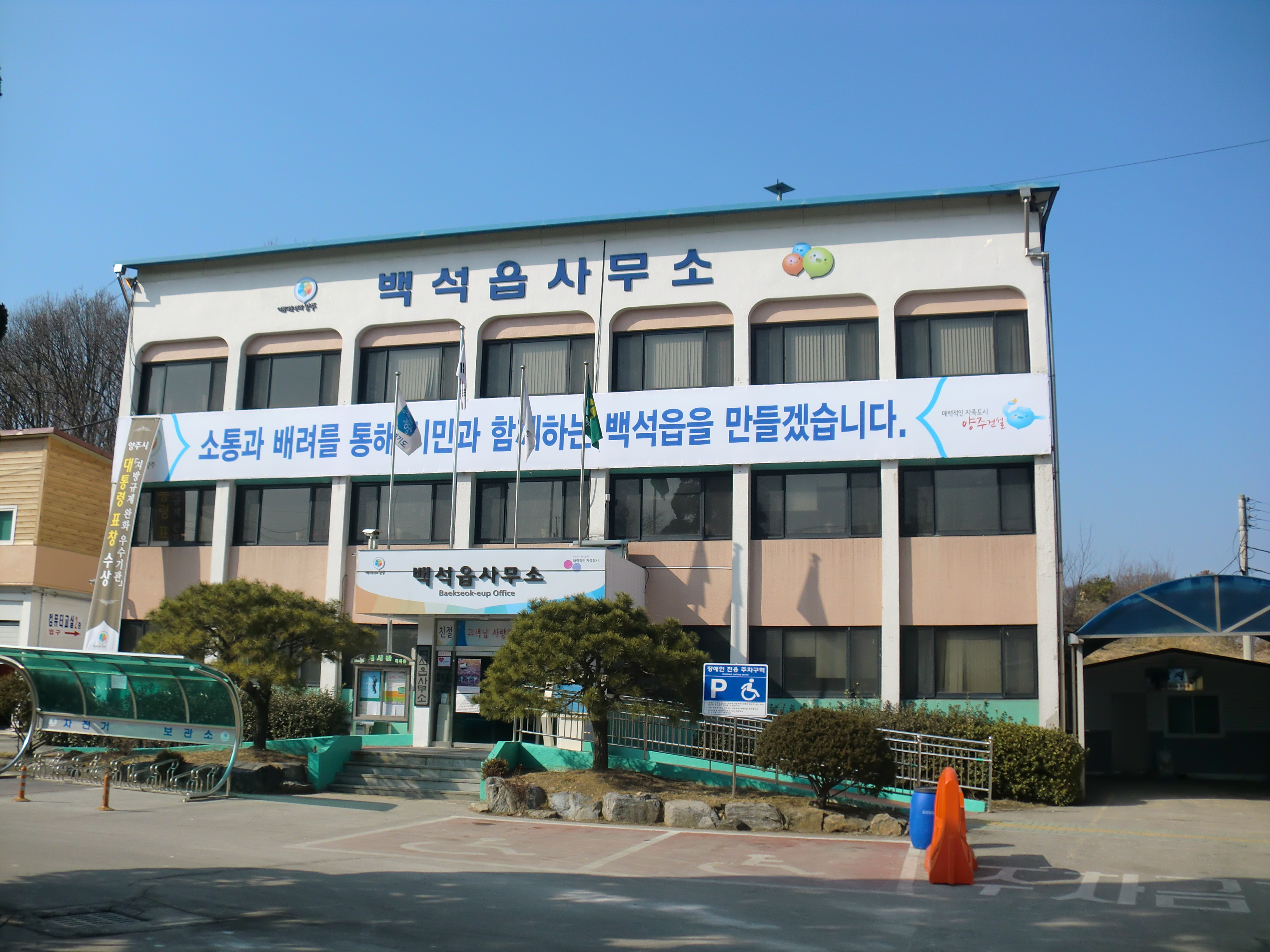 경기도 양주시 백석읍에 있는 백석읍사무소